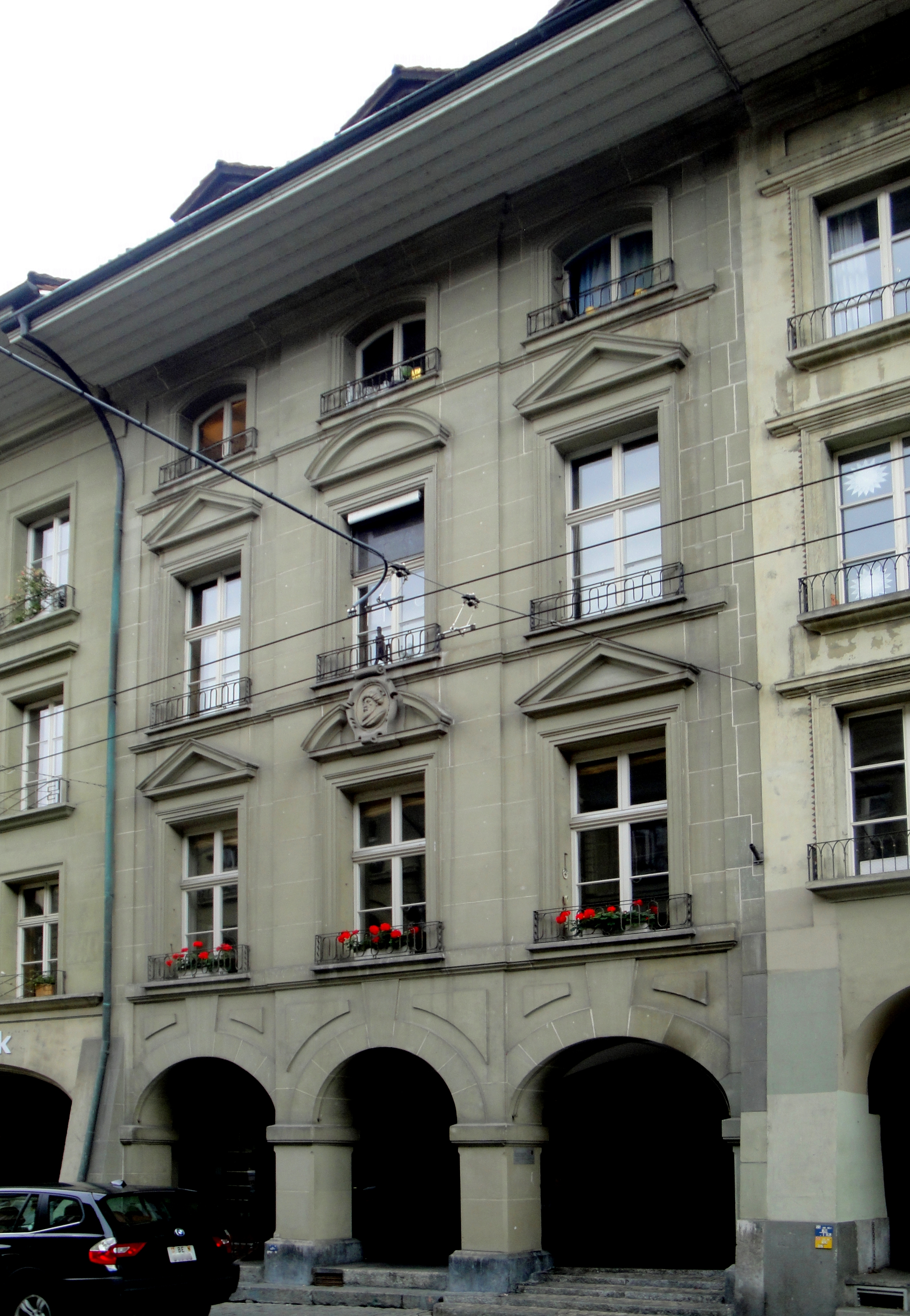 Bern, Zunfthaus zu Kaufleuten (Kramgasse 29)